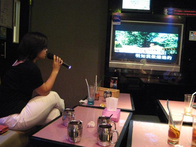 中文（香港）: 唱卡拉OK的人